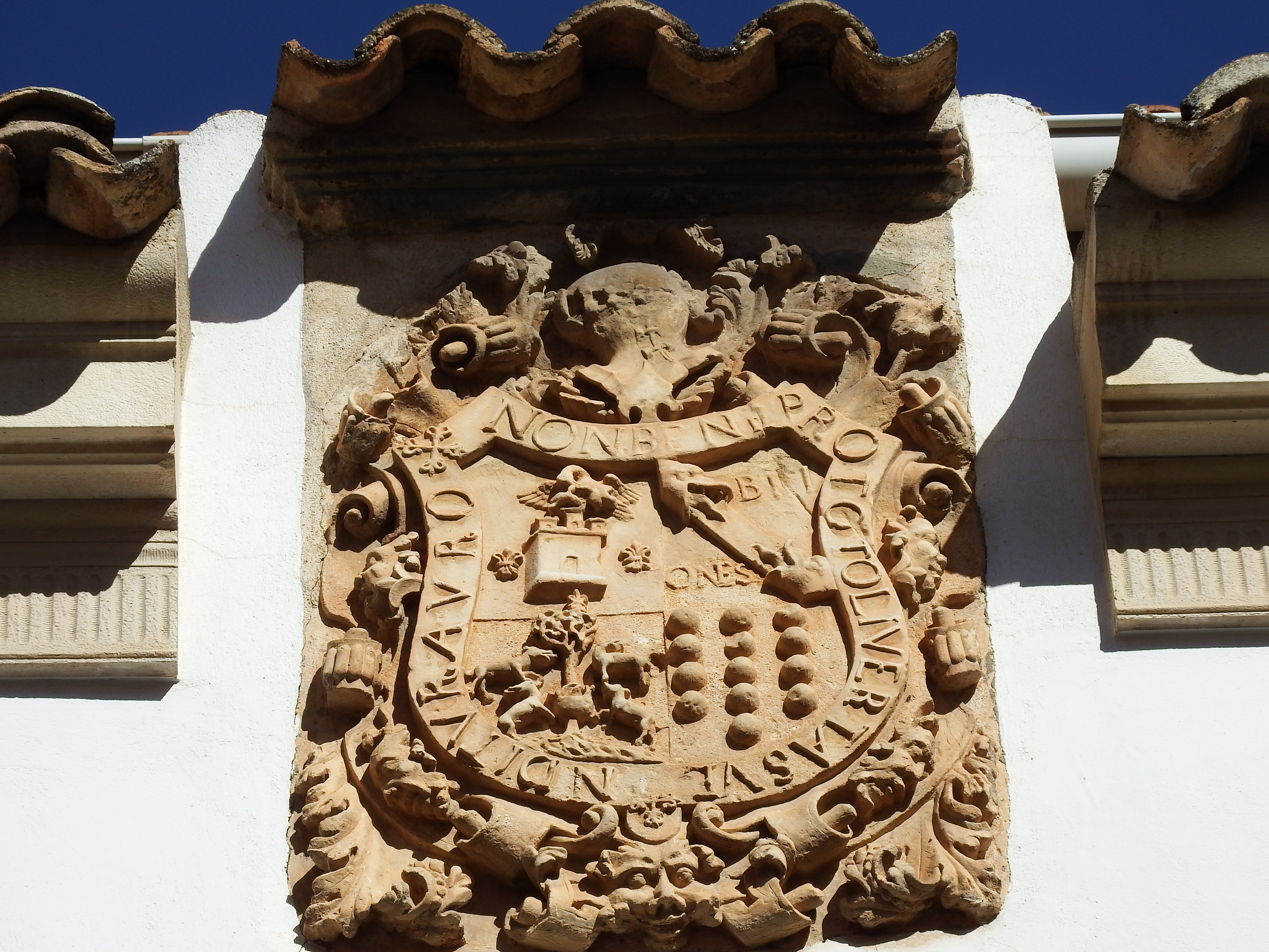 Escudo en un edificio singular en Motilla de Palanacar